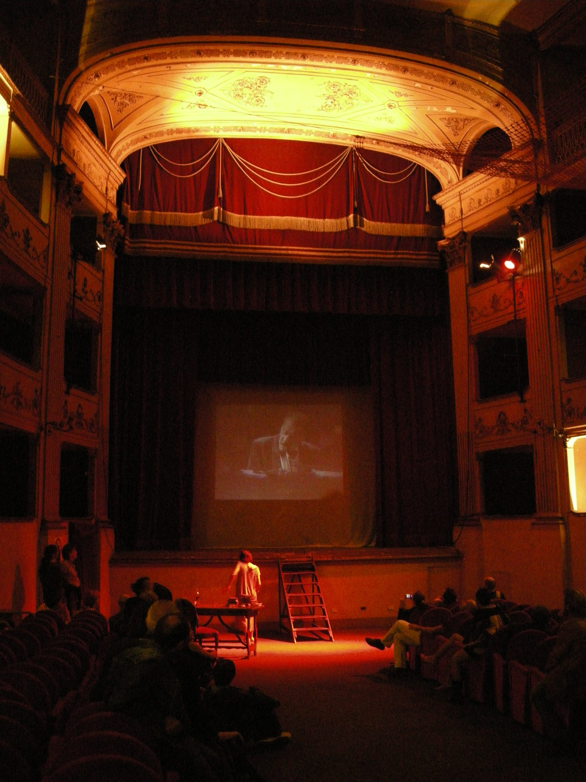 Teatro niccolini, interno, sala